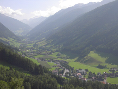 Ansicht des Ahrntales von St. Johann aufwärts